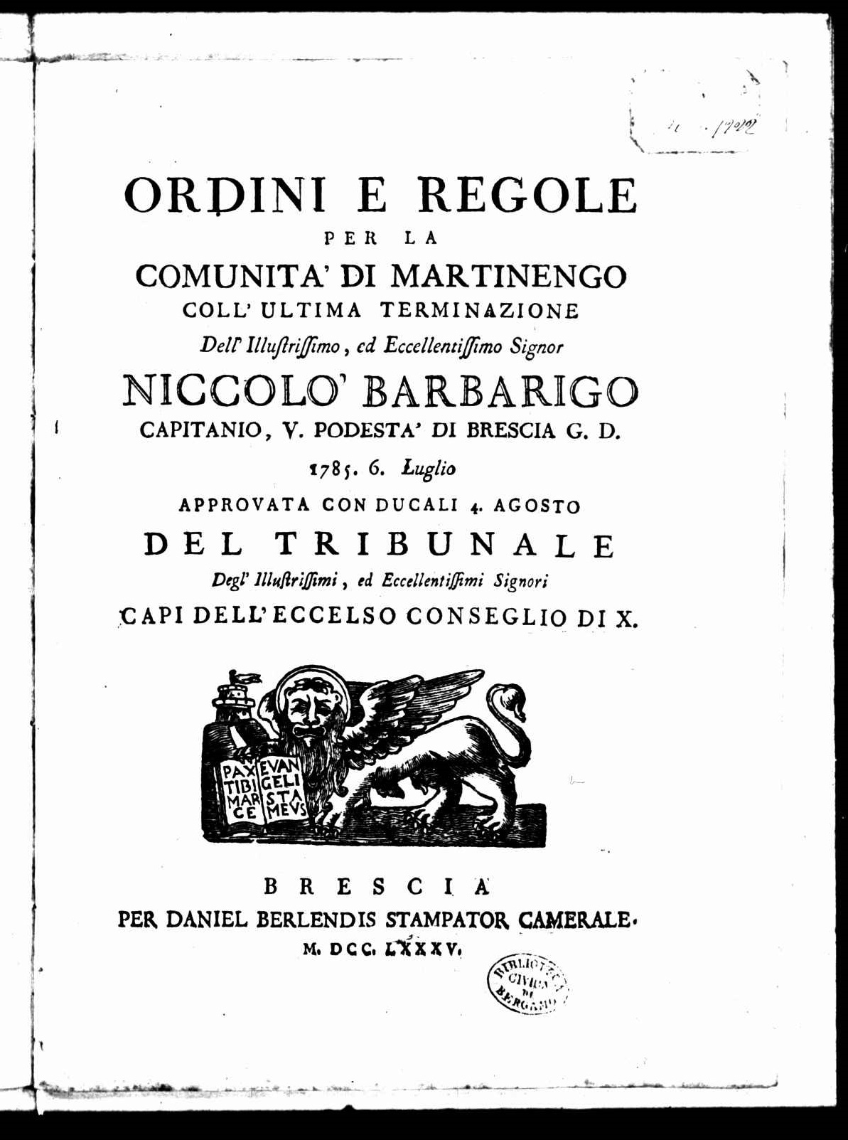 Frontespizio